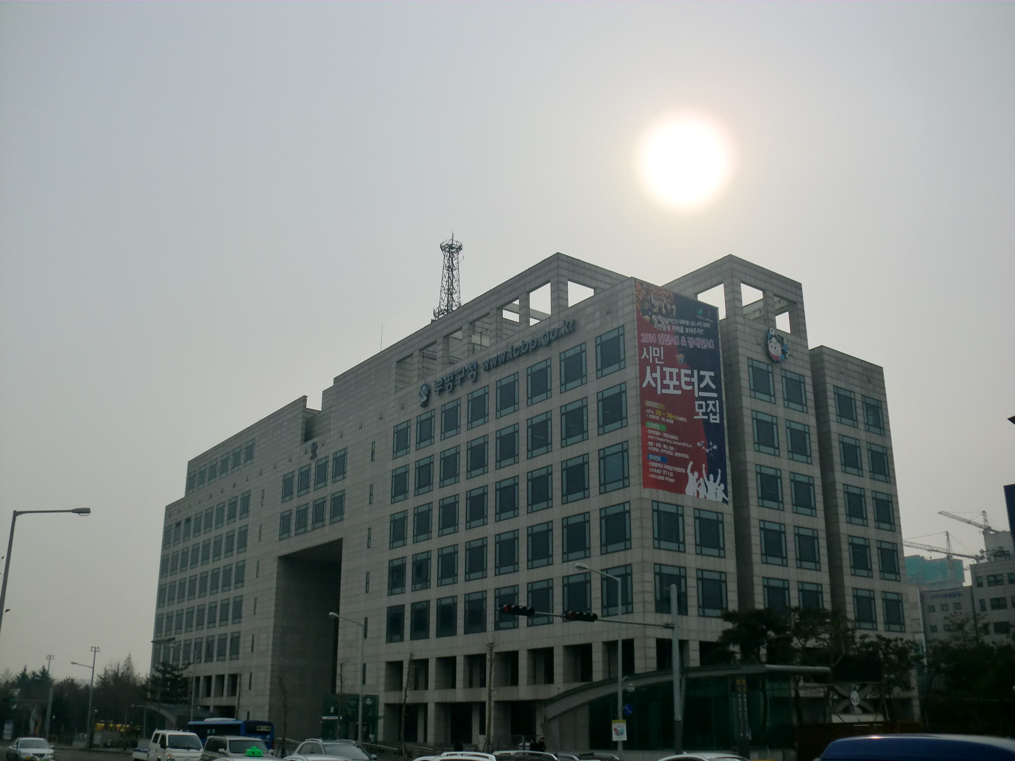 인천광역시 부평구에 있는 부평구청